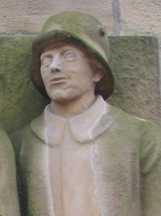 Kriegerdenkmal bei der Peterskirche in Heilbronn-Neckargartach